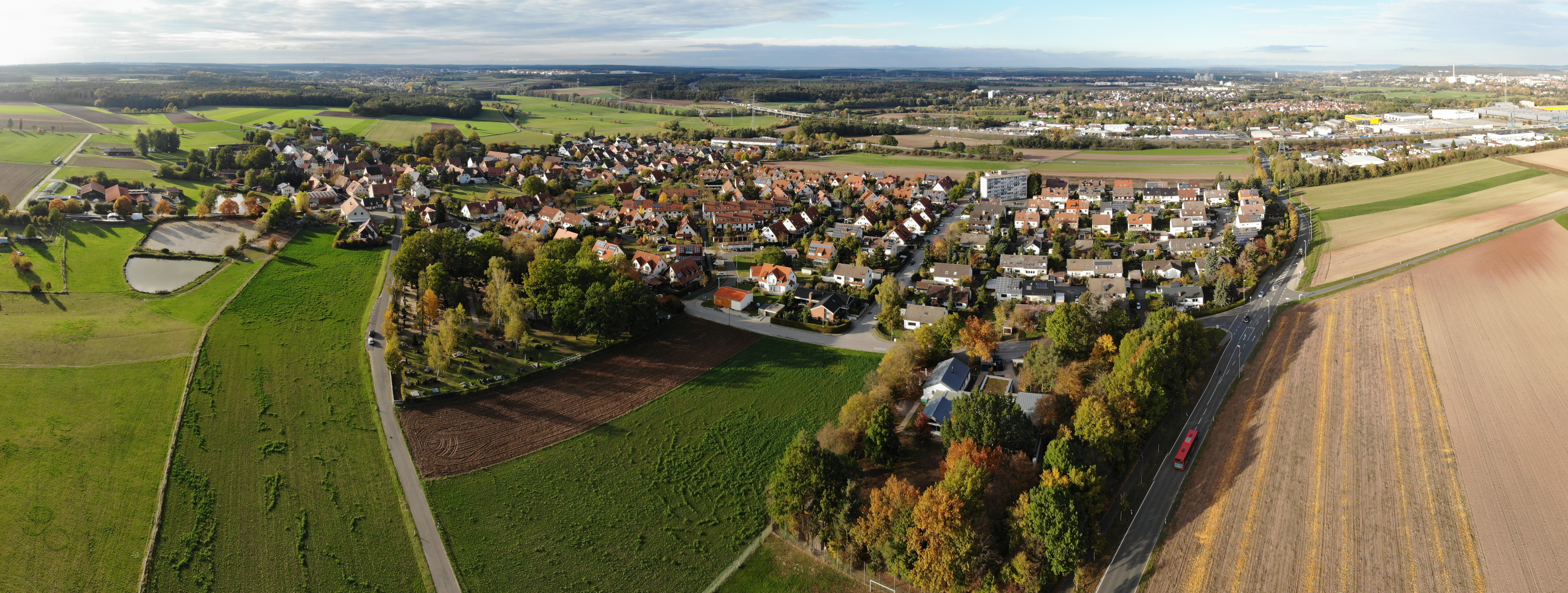 Kriegenbronn Panorama Luftbild (2019)